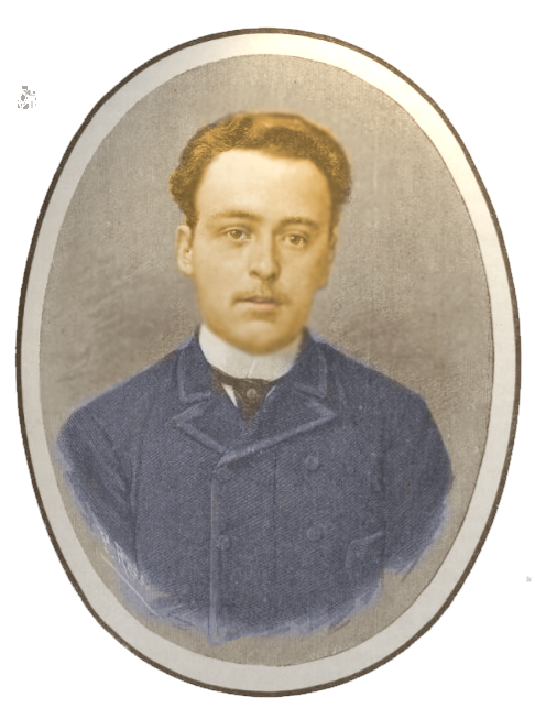 Roberto J. Payro c. 1888